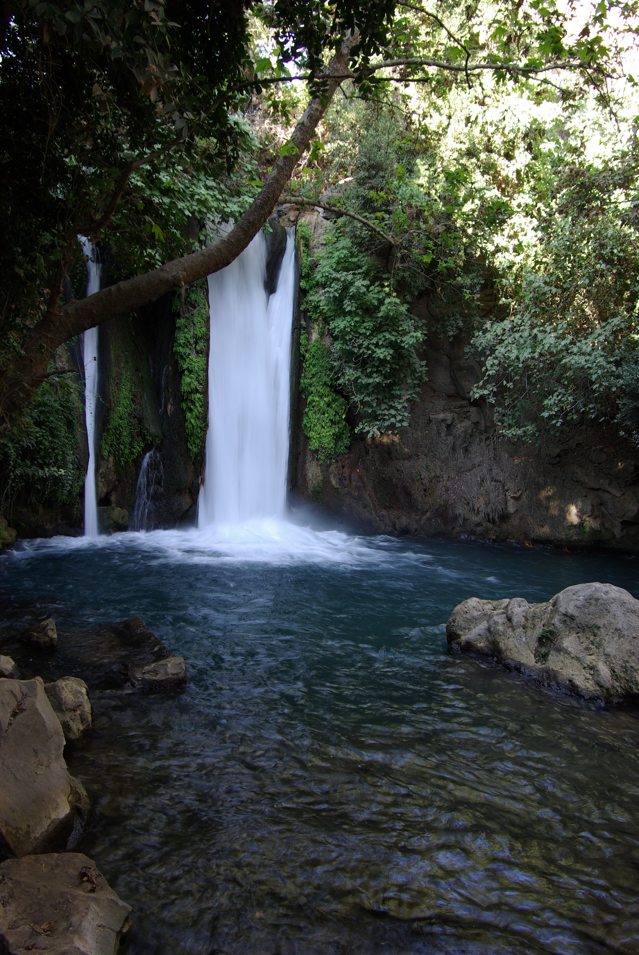 Wasserfall in Banyas